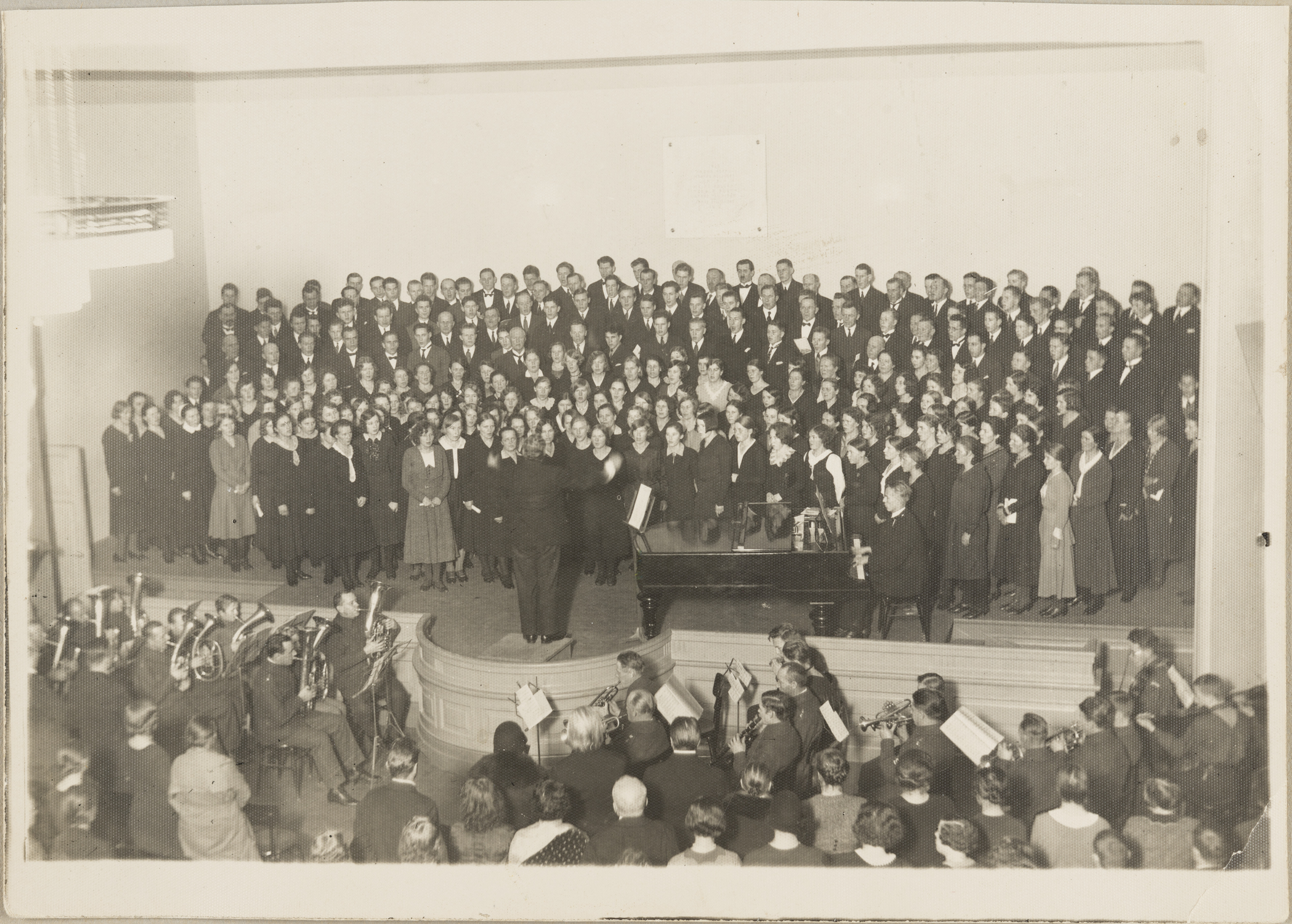 Kuvan käyttöoikeudet: CC BY 4.0 Kuva on julkaistu Nimeä 4.0 Kansainvälinen (CC BY 4.0)-lisenssillä. Verkkopalvelussa julkaistua näyttökuvaa voi käyttää vapaasti myös kaupallisessa käytössä. Kuvan yhteydessä on mainittava tekijä ja/tai kuvaaja sekä säilyttävän organisaation ja kokoelman nimi.